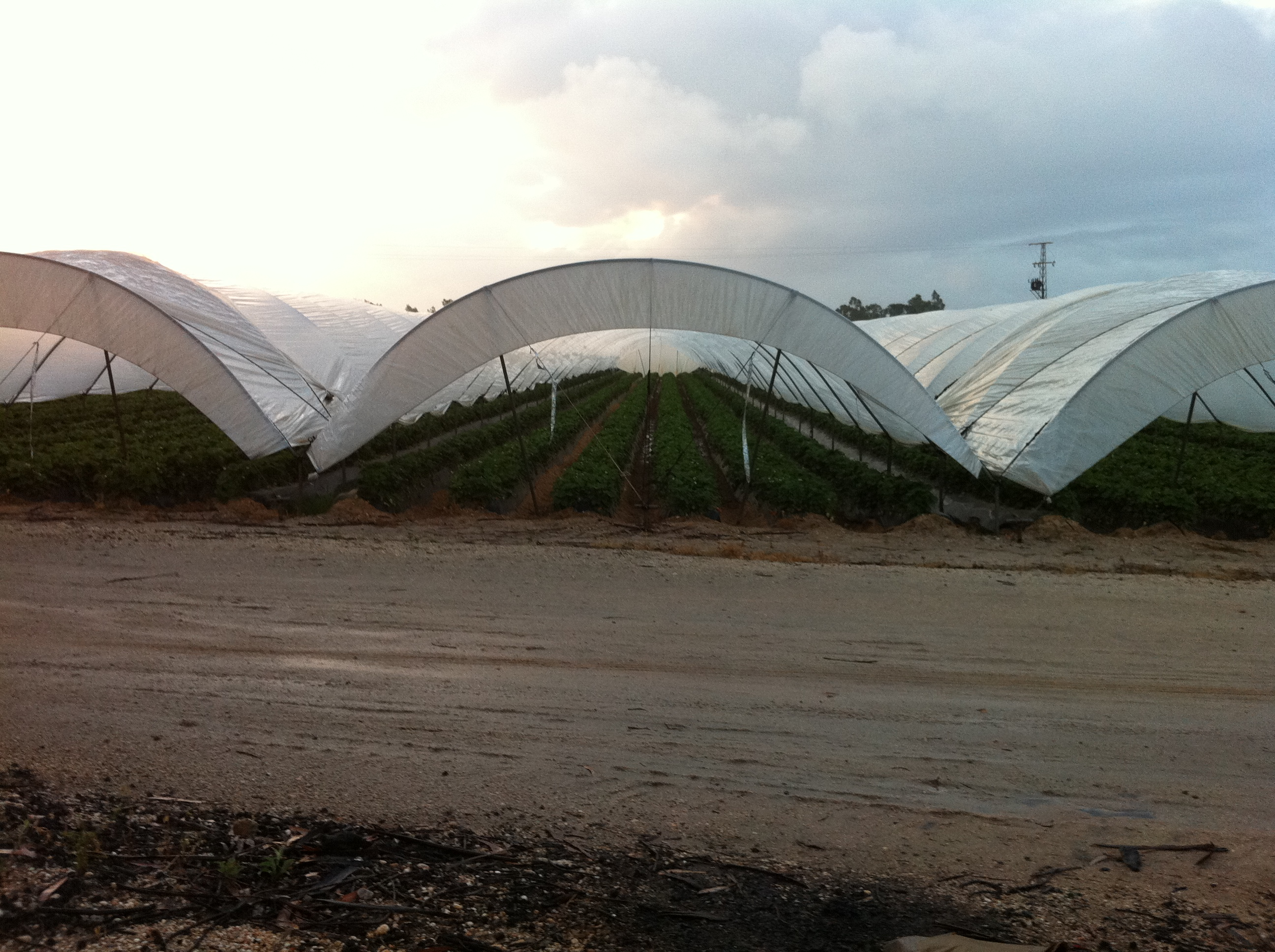 Cultivo de Fresón en Moguer (Huelva).